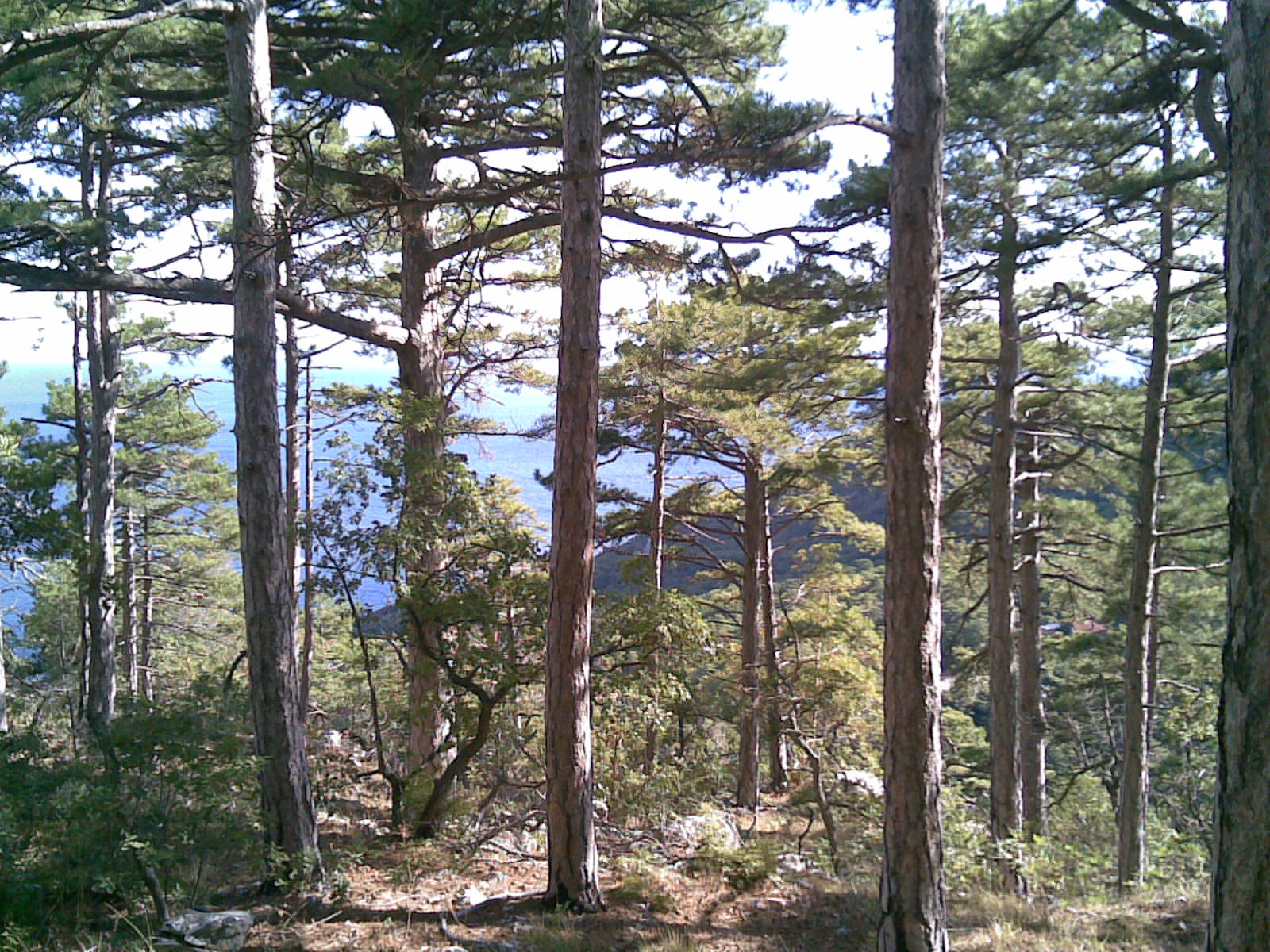 Лес из крымской сосны.